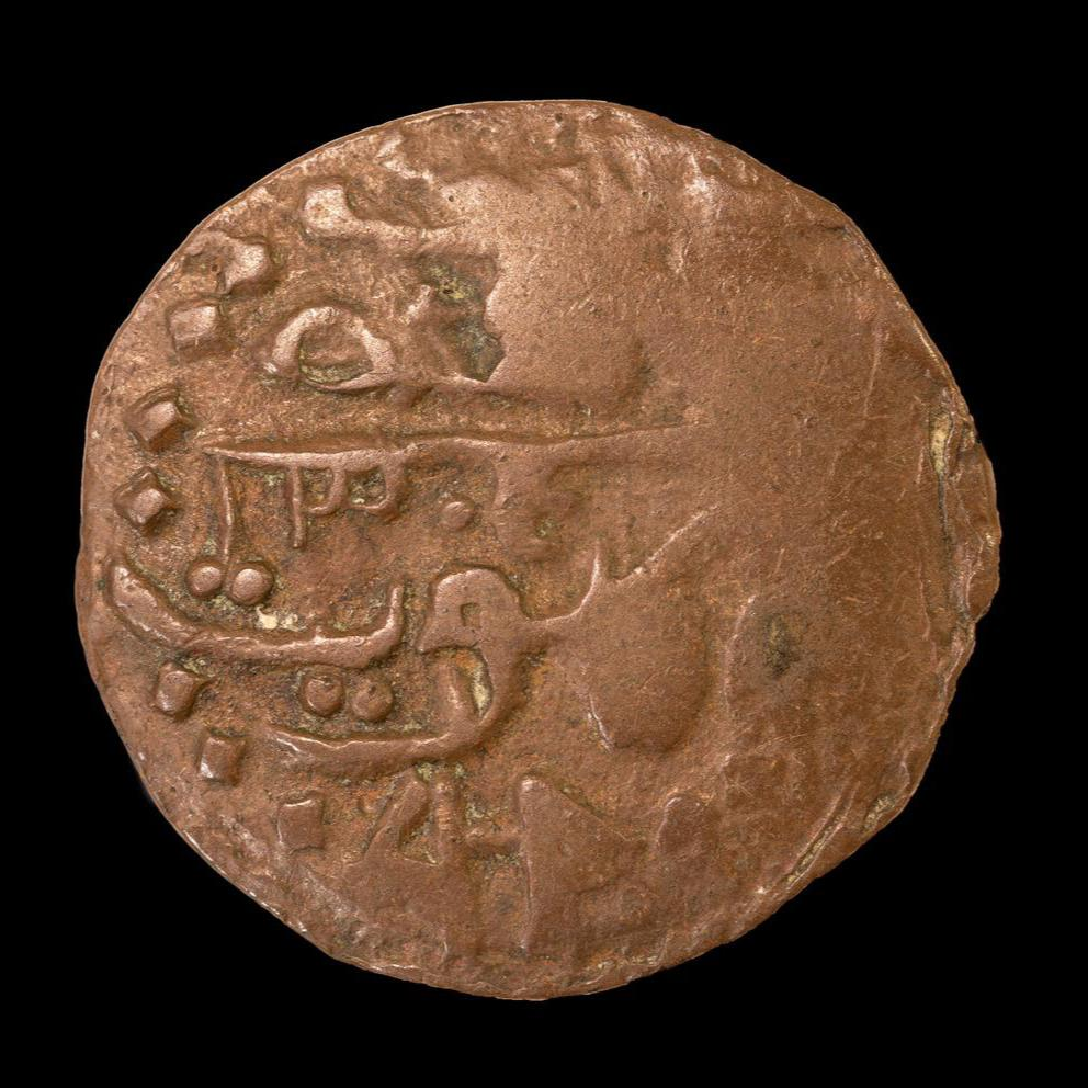 الوجه الأمامي للبيزة الكويتية وكتب عليها ضرب الكويت ١٣٠٤هـ